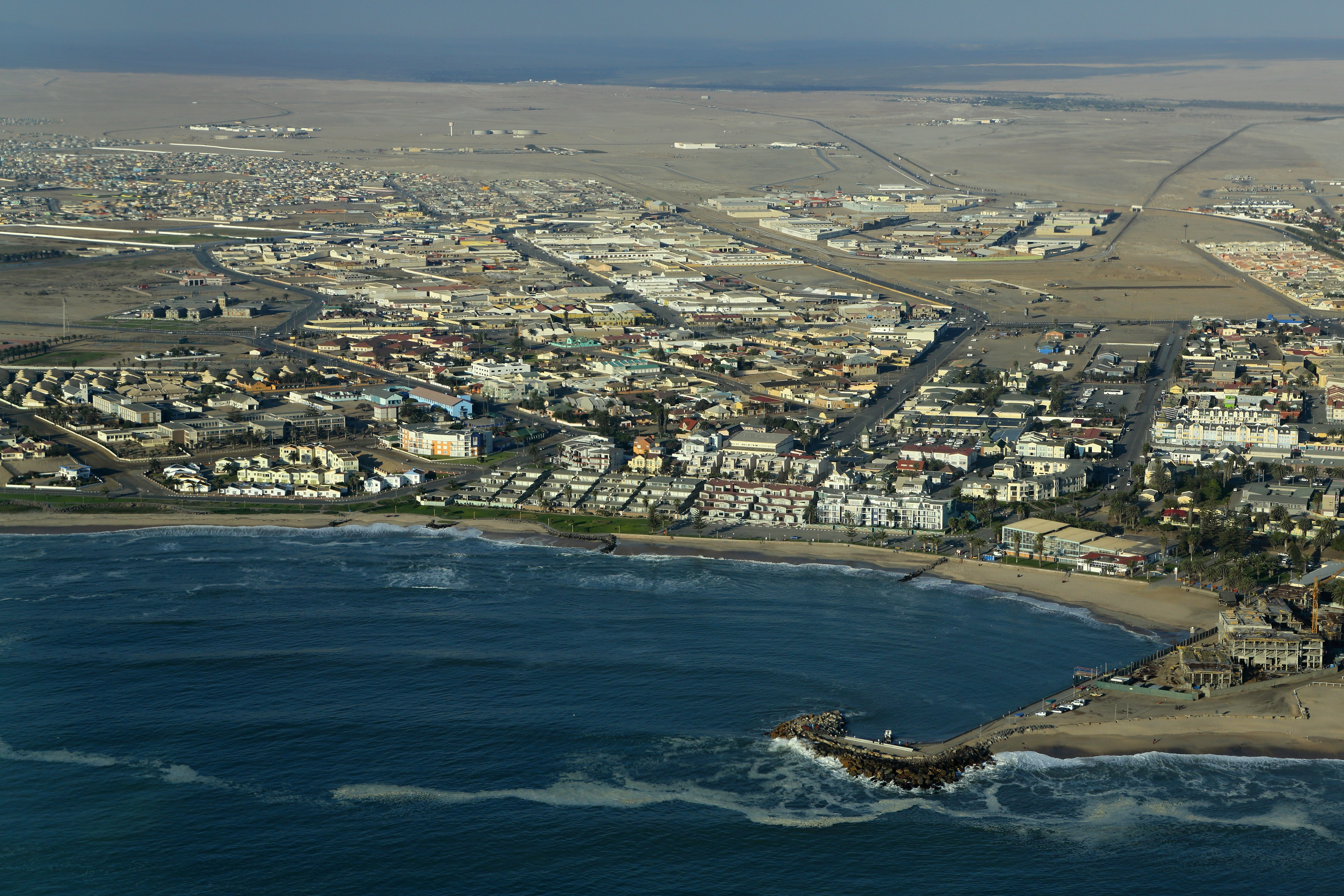 Swakopmund